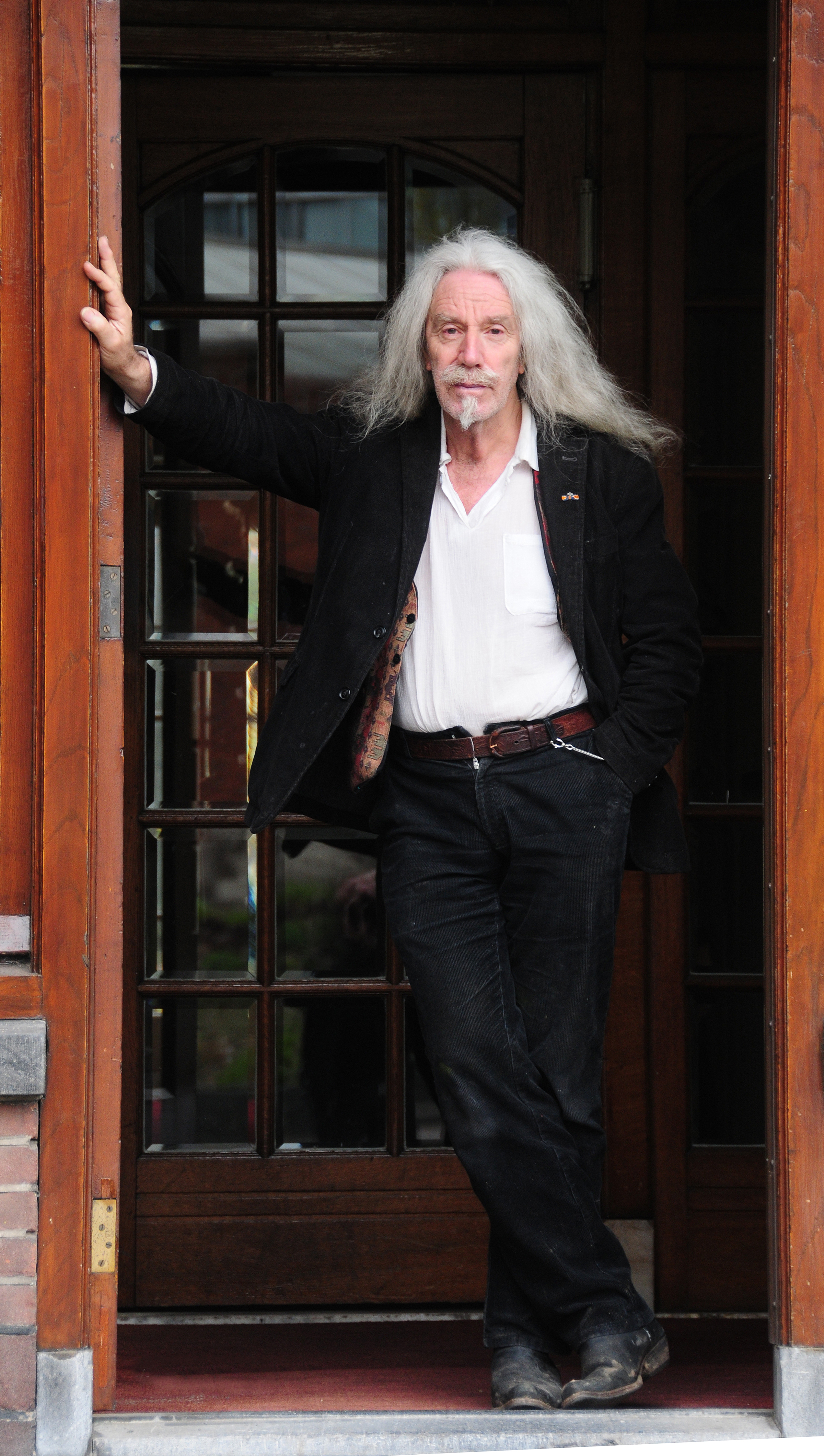 Cornelis le Mair aan het Van Abbehuis te Eindhoven